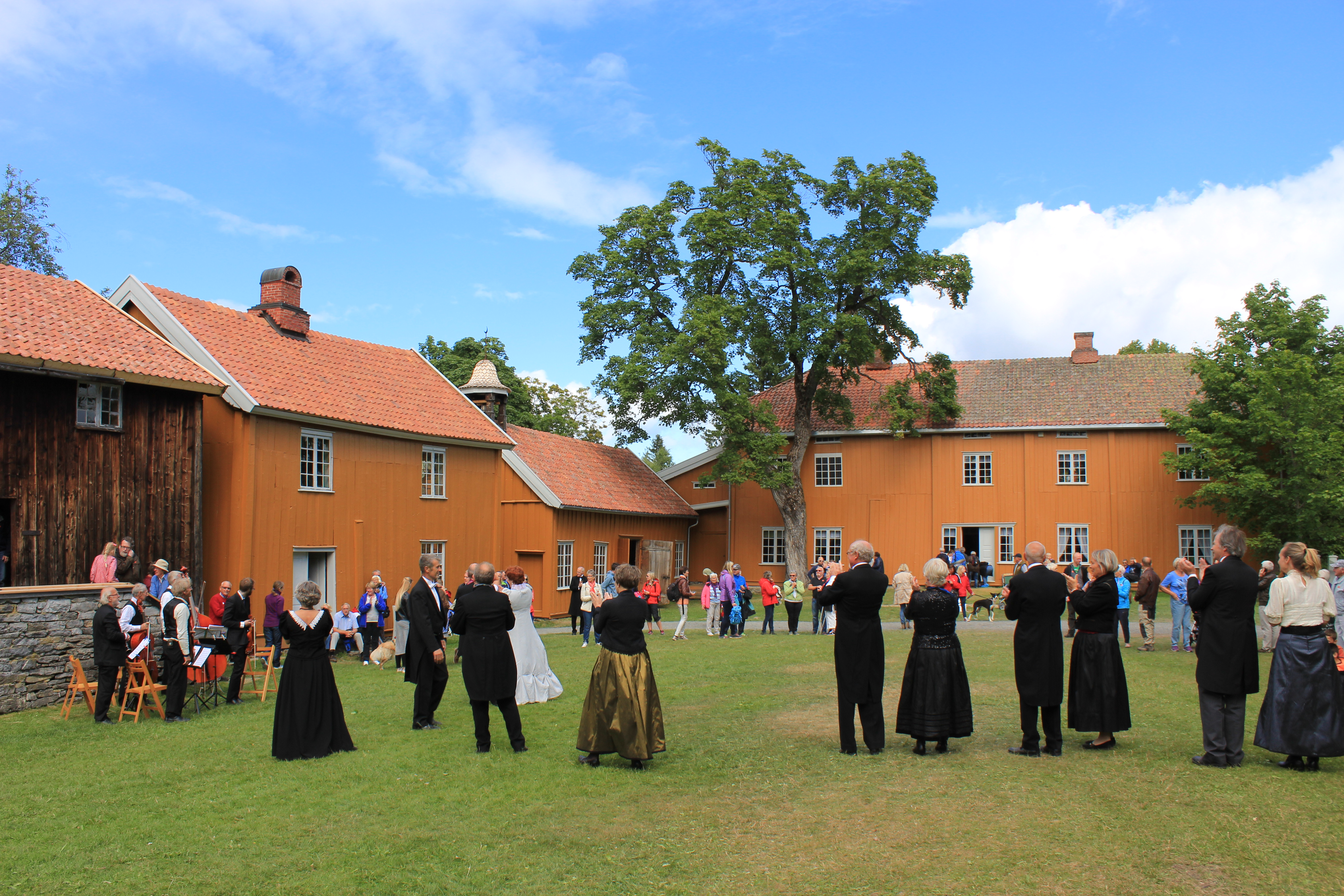 Tunet